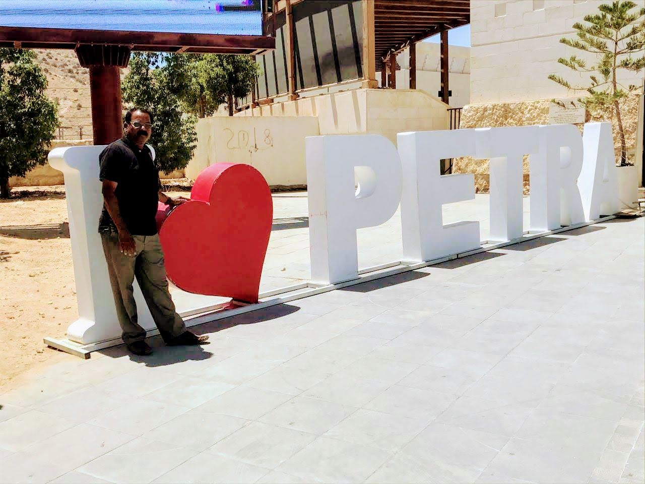 പെട്രയുടെ പ്രവേശന കവാടത്തിൽ